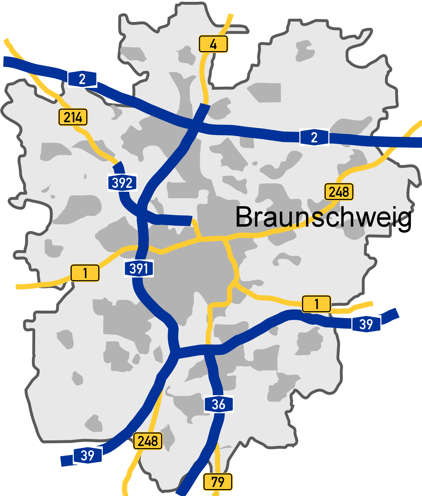 Autobahnen und Bundesstraßen in Braunschweig